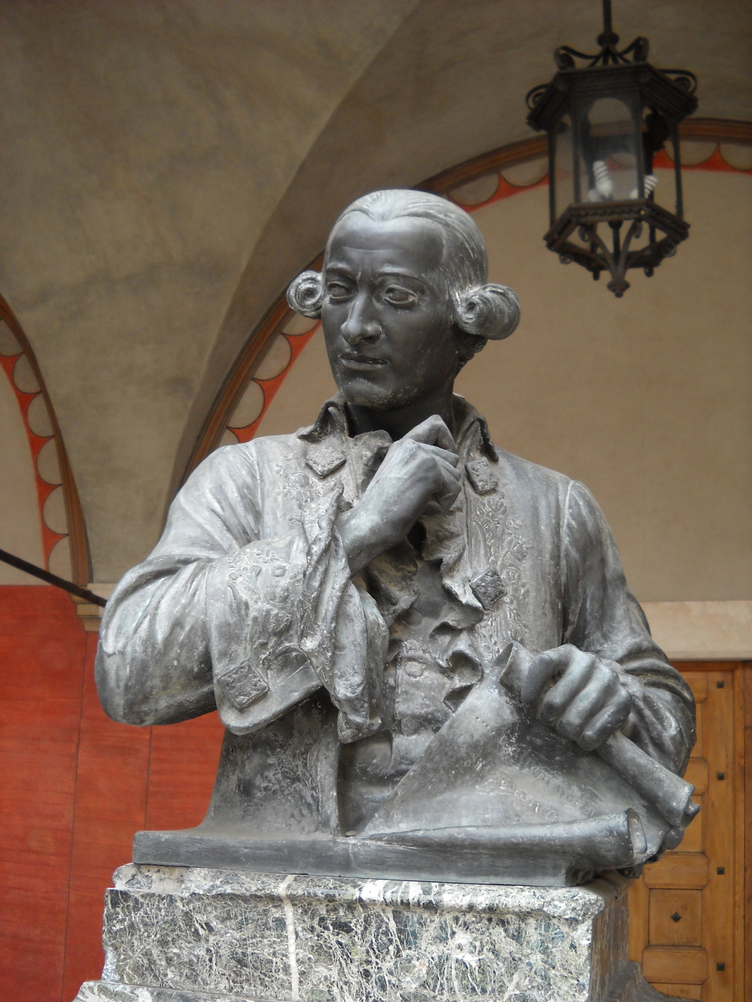 Ritratto di Clementino Vannetti da una statua ottocentesca presso Rovereto